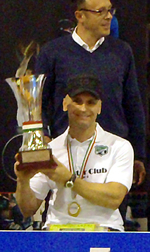 Fabio Cassanelli - Coppa Italia 2012.